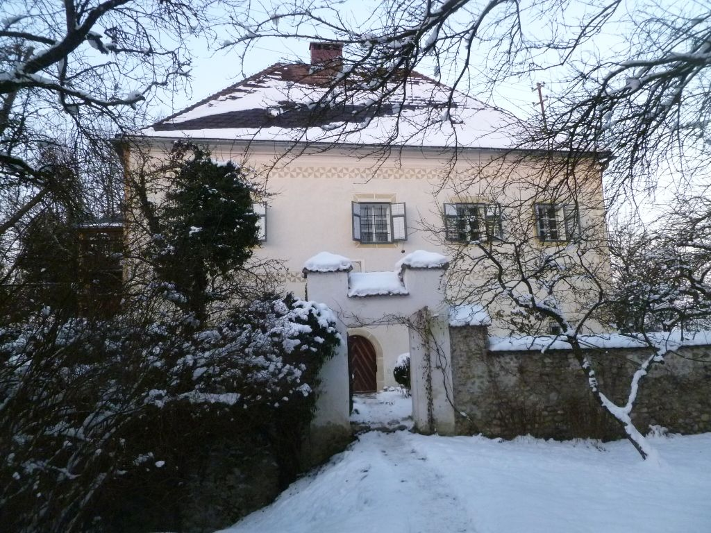 Schloss Schieferegg heute